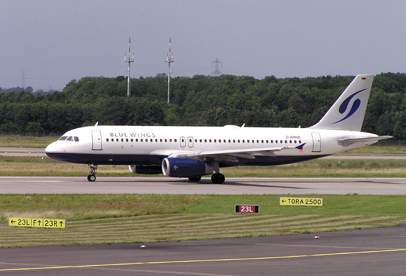 Blue Wings A320-200 (D-ANNB) in Düsseldorf (EDDL)